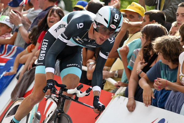 Frank Schleck